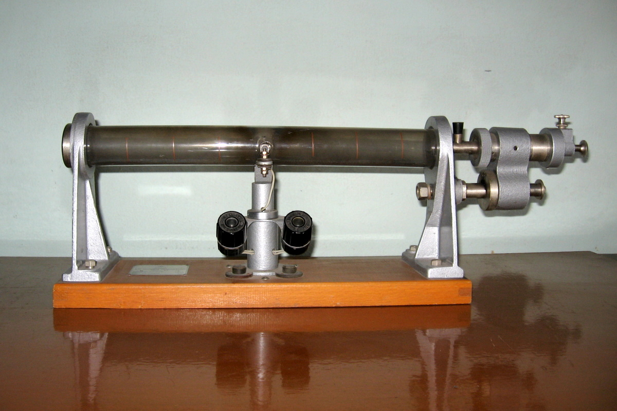 Rock dusting control device PKO-1m – Прибор для контролю осланцювання ПКО-1м